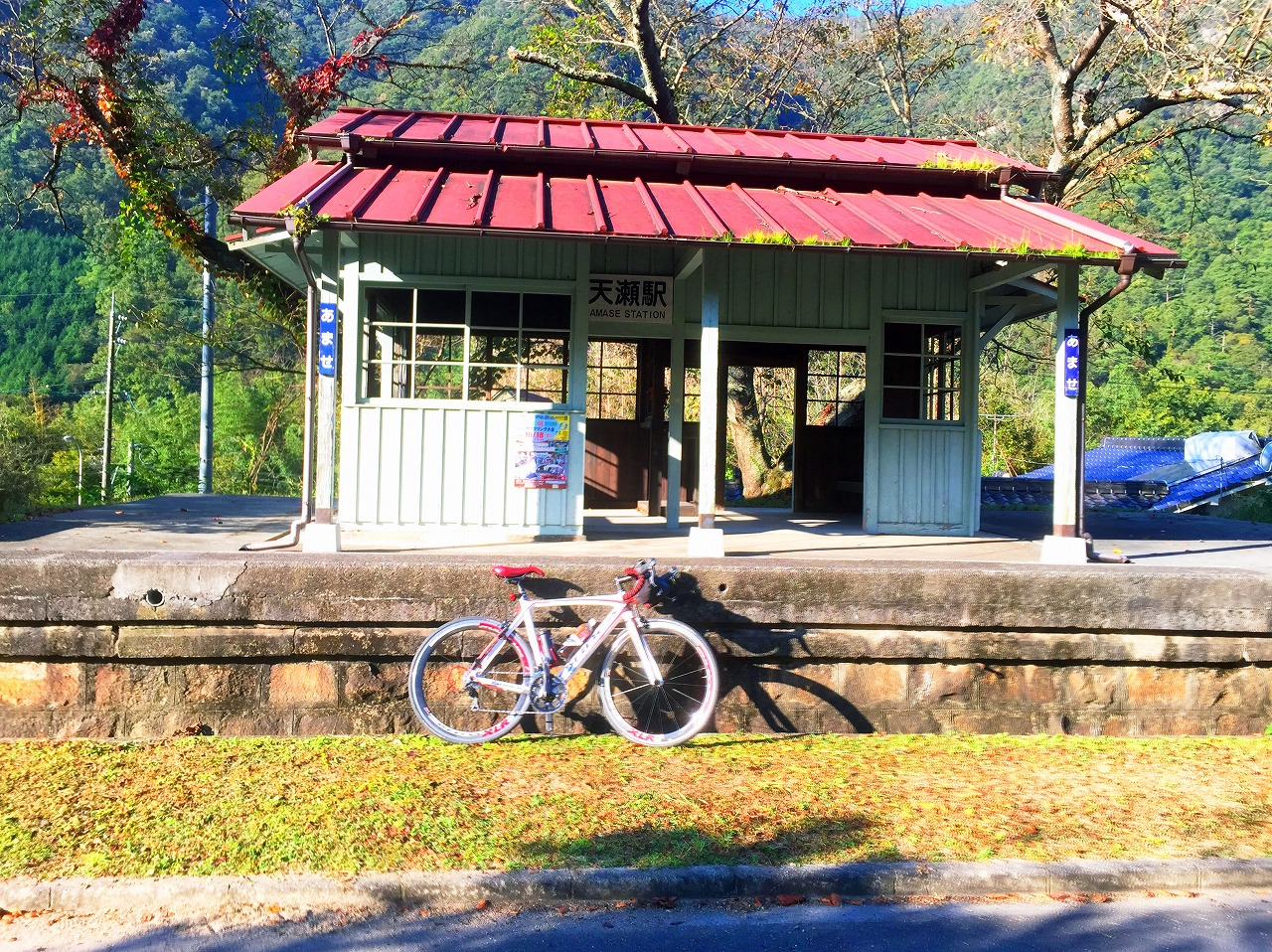 岡山県道703号備前柵原自転車道線 旧同和鉱業片上鉄道 岡山県 天瀬駅